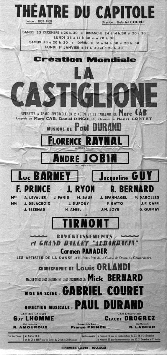 Théâtre du Capitole. Le 29 Décembre 1967. Vue de l'affiche de l'opérette de La Castiglione au théâtre du Capitole.